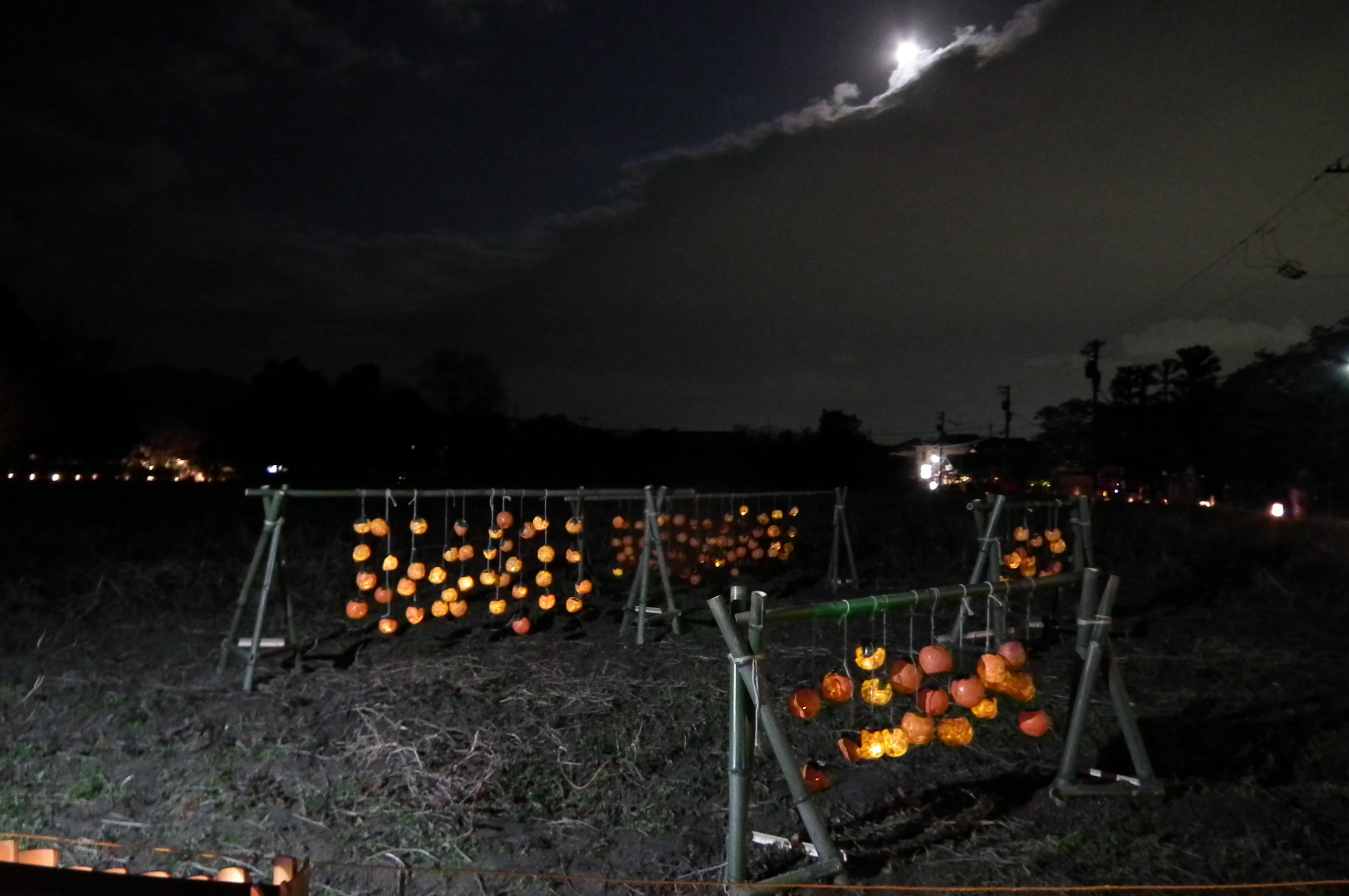 Arashiyama Hanatōro 嵐山花灯路 落柿舎